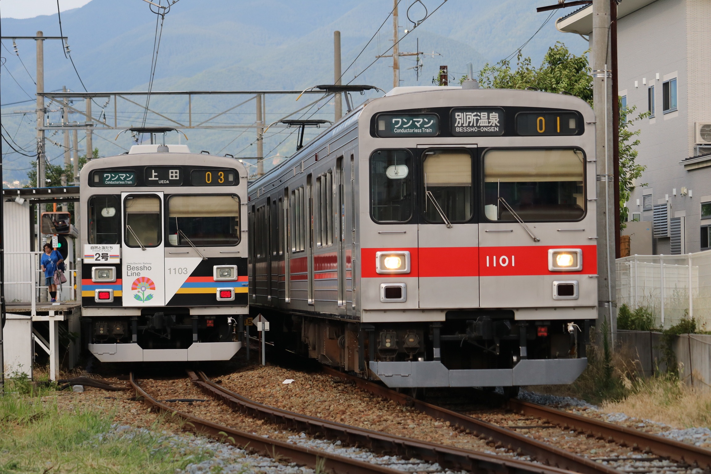 2018年8月1日 城下駅にて